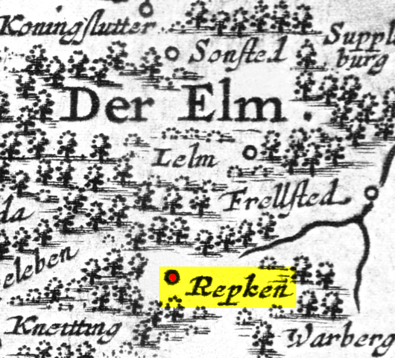 Der Elm mit Räbke aus Charte vom Herzogthum Braunschweig, gestochen von Müller in Braunschweig